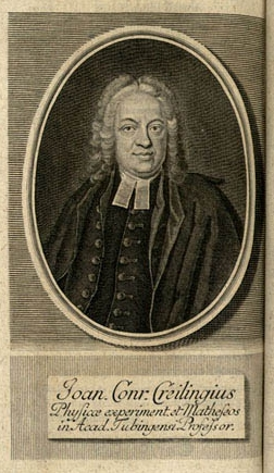 Titelkupfer: Der Professor der mathematischen Wissenschaften und der Naturphilosophie in Tübingen, Wunderdoktor und Alchemist Johann Conrad Creiling (1673–1752).